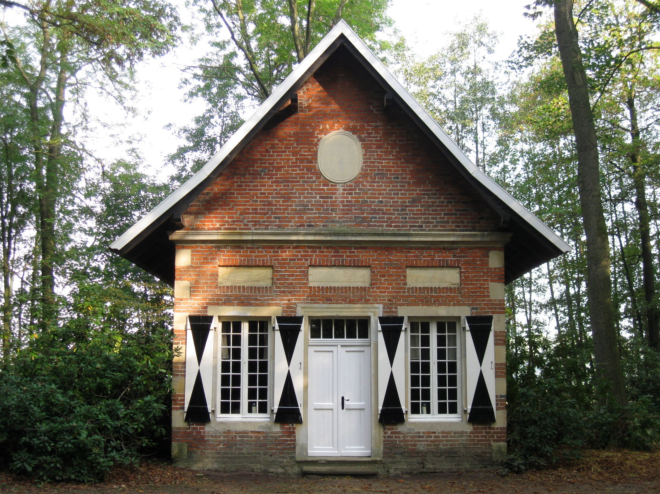 Gartenhaus bei Burg Hülshoff, Havixbeck